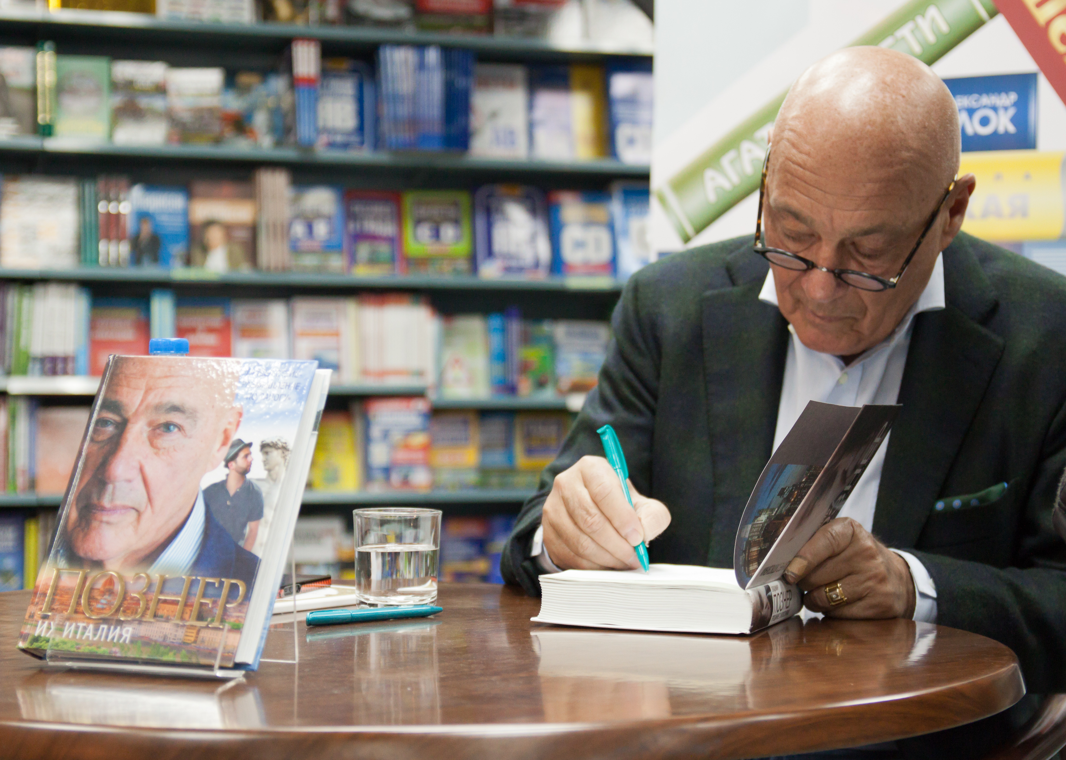 Владимир Познер на презентации книги "Их Италия" ("Дом книги" на Новом Арбате)